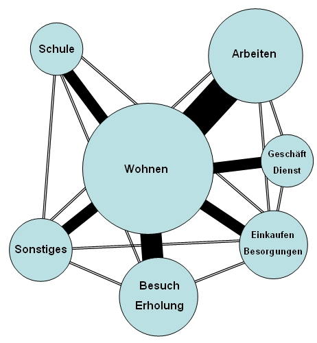 Verkehrsteilnahme verknüpft mir den Grunddaseinsfunktionen; die Breite der Linien beschreibt die Häufigkeit der Verkehrsteilnahme zwischen den einzelnen Grunddaseinsfunktionen